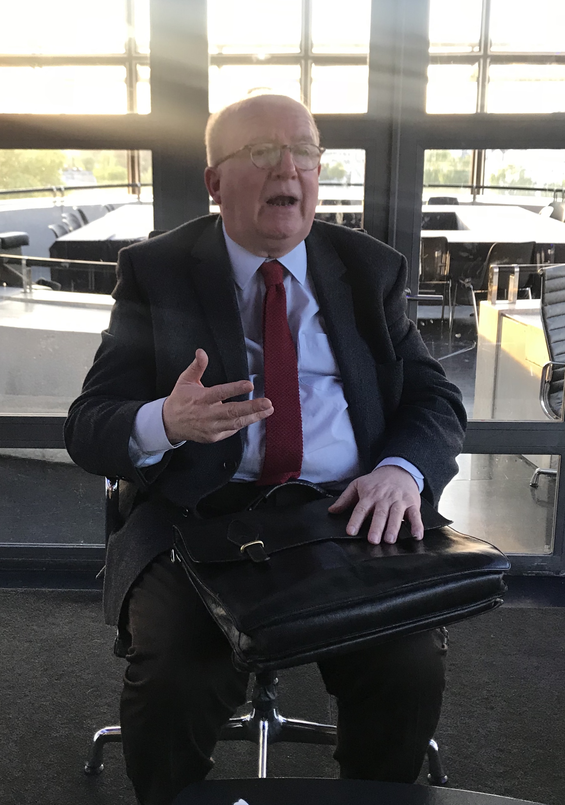 Le philosophe Christian Jambet, en conférence à l'Institut du monde arabe, Paris, 3 mai 2018.